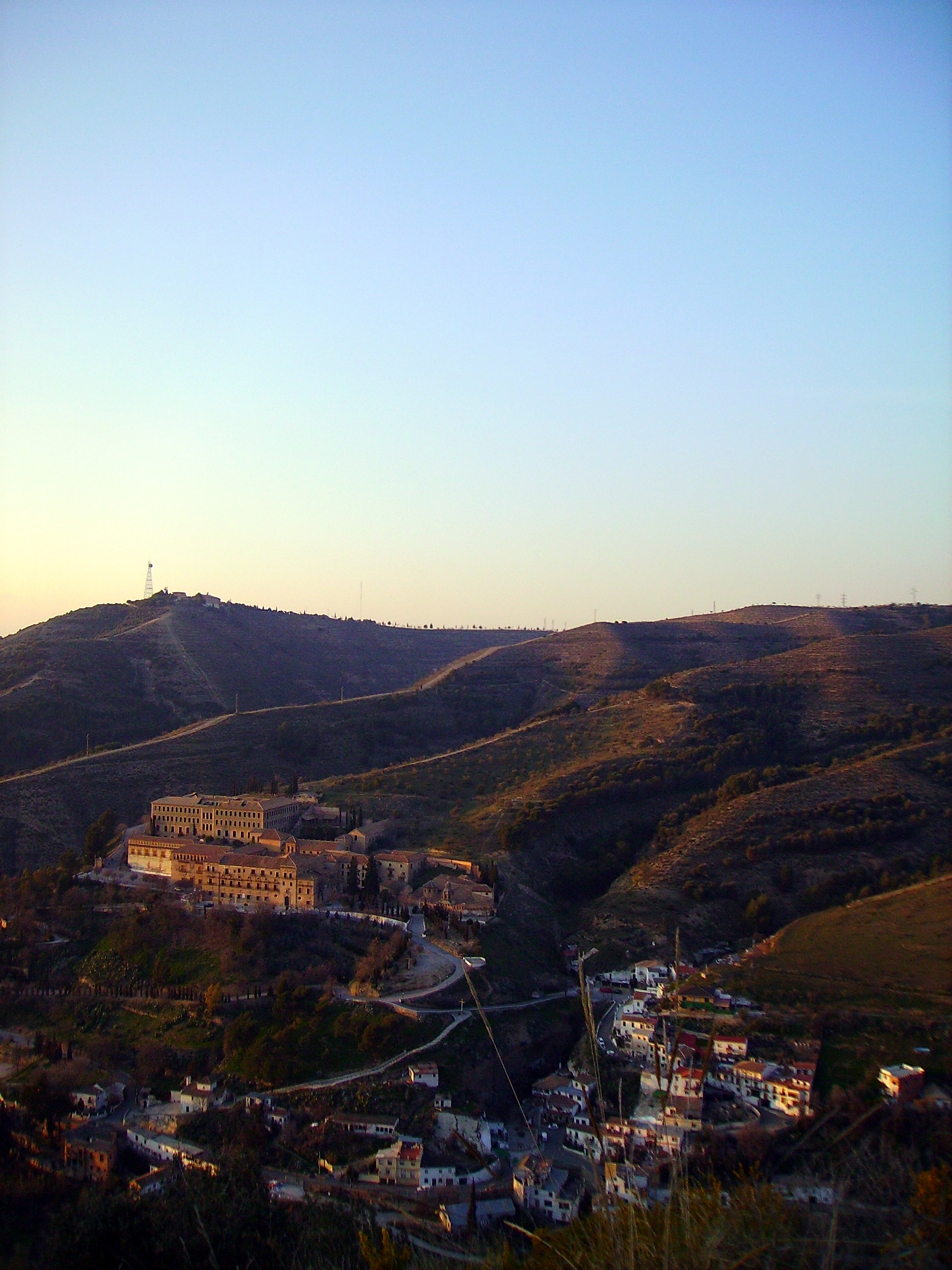 Sacromonte abbey and cuevas